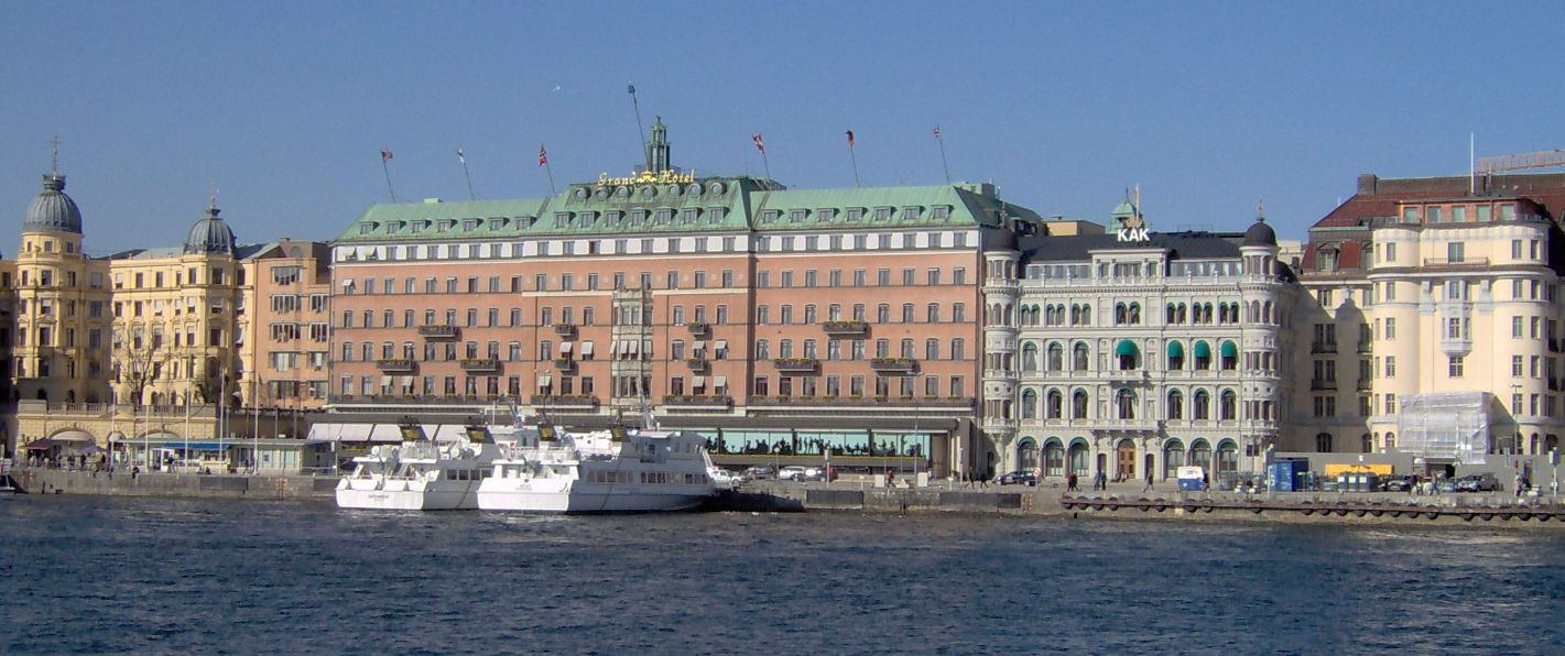 Blasieholmen, Grand Hotel, Stckholm, Sweden